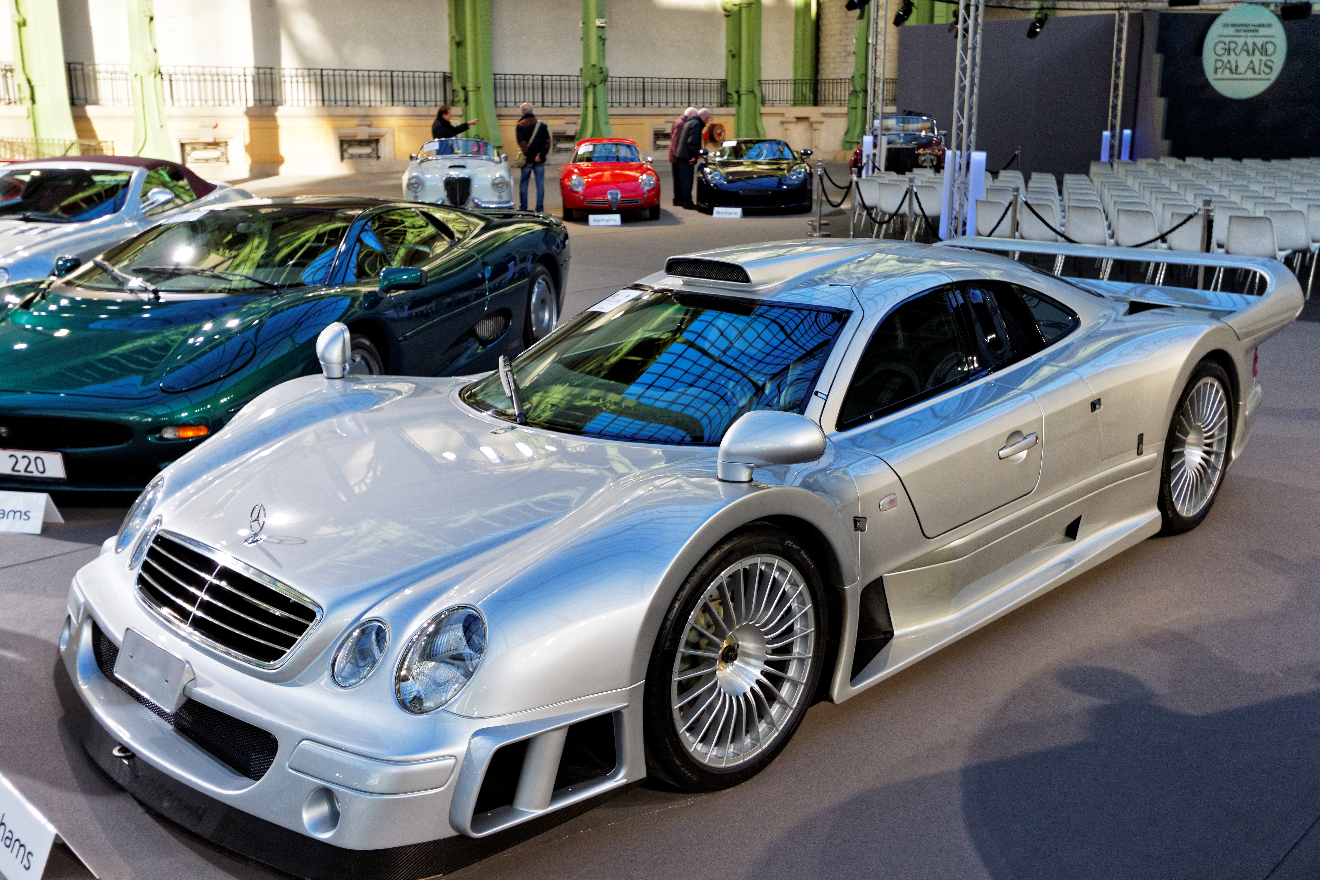 Un des véhicules présenté lors de la vente aux enchères Bonhams 2016 au Grand Palais de Paris.